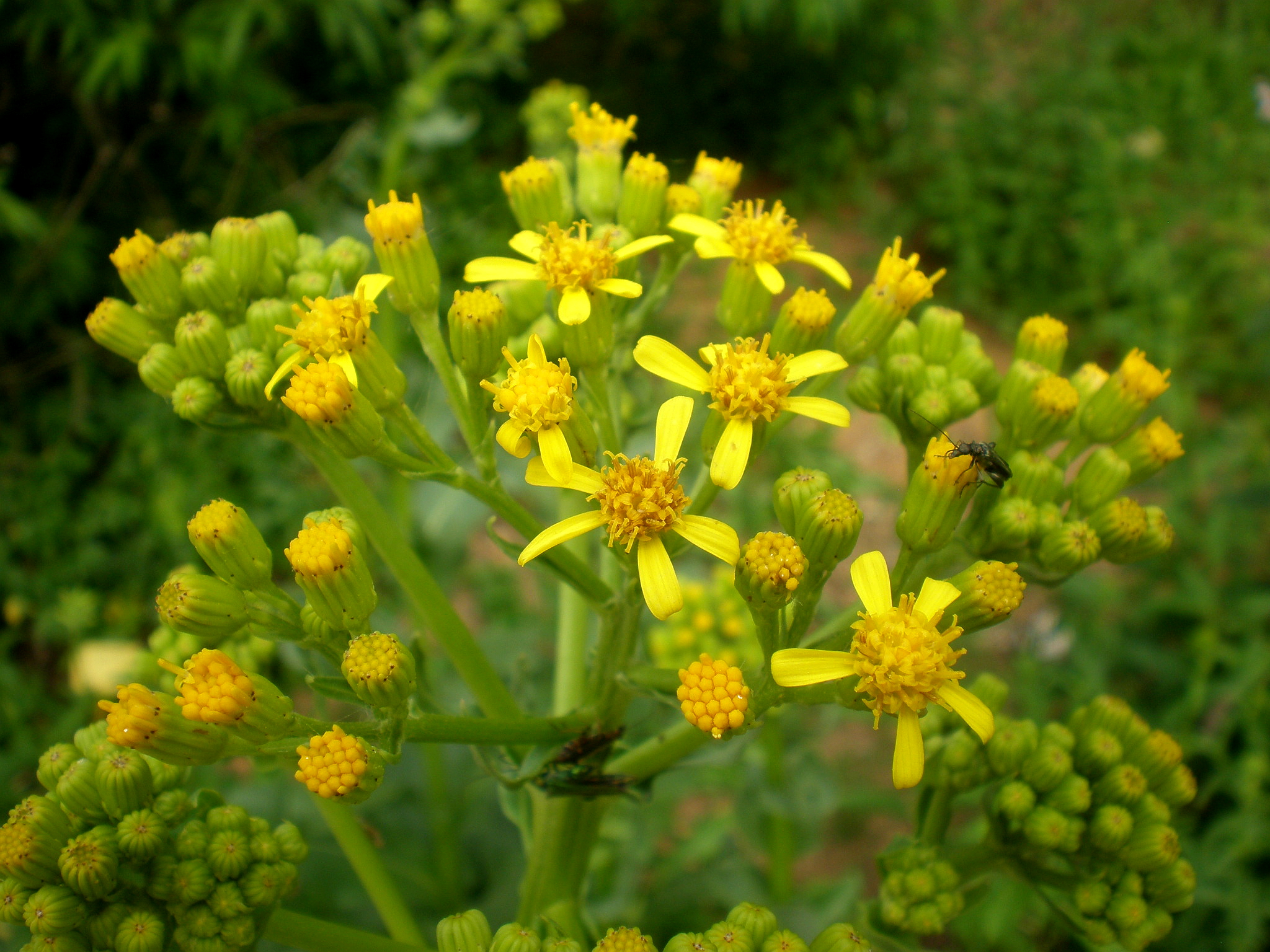 Jardín Botánico de Barcelona.